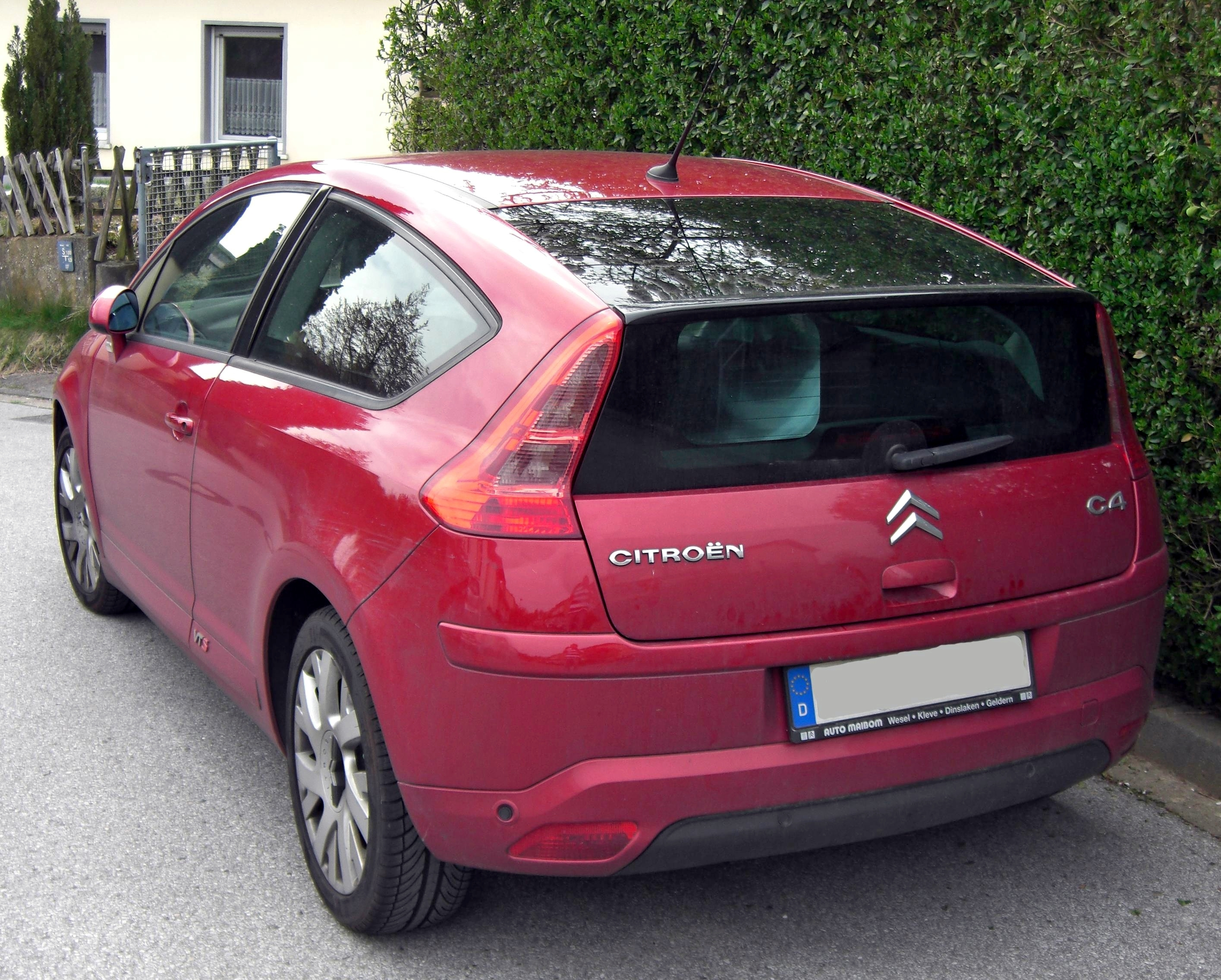 Citroen C4 Coupé